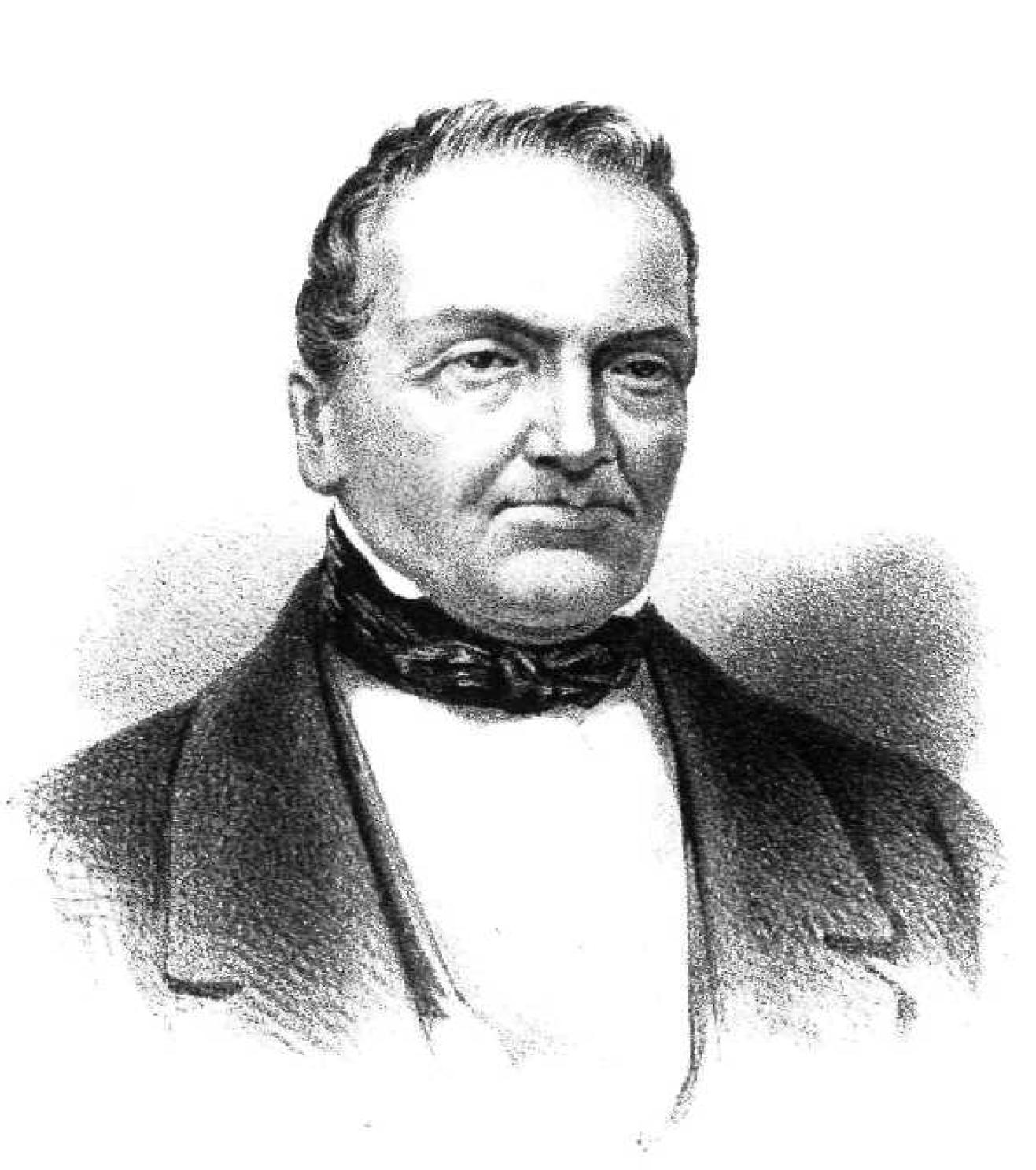 Griechischer Bankier und Stifter, 19. Jahrhundert